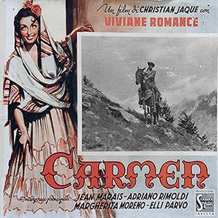 Pubblicità d'epoca della "Carmen, il film girato a San Donato nel 1942.Nell'immagine, le montagne tra Monte Pizzuto e il Vallone Forca d'Acero